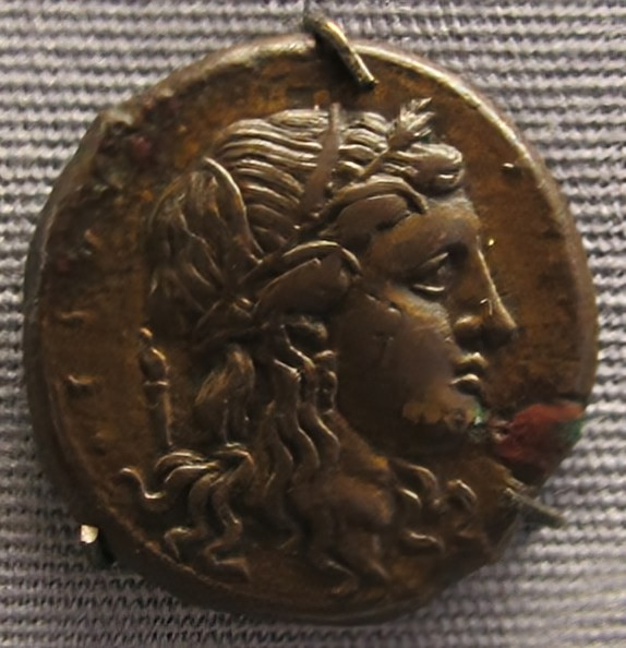 Syrakus, aes di pirro d'epiro, 278-275 ac. ca